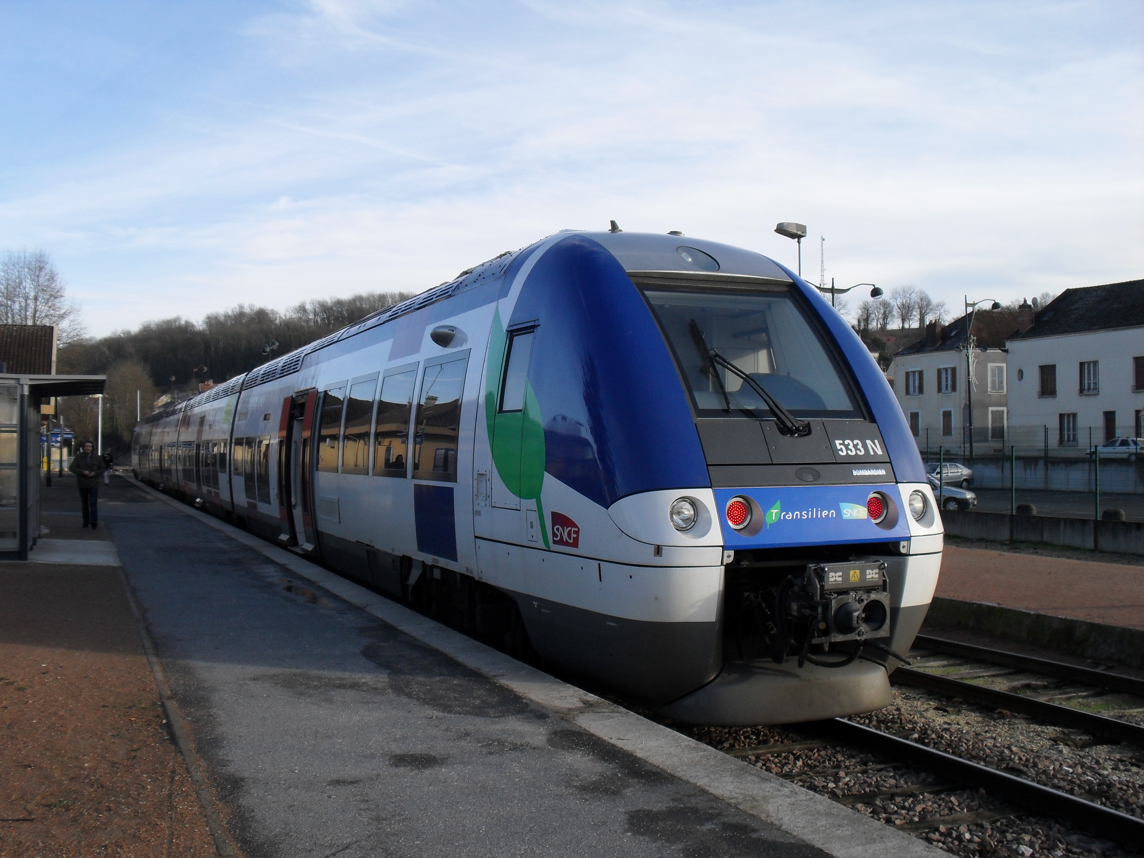 B 82500 Transilien à Provins